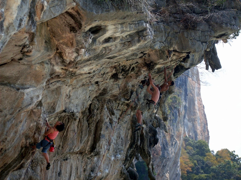 Krabi Kaya Tirmanicilari